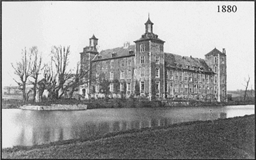 Château de Fraciennes en 1880